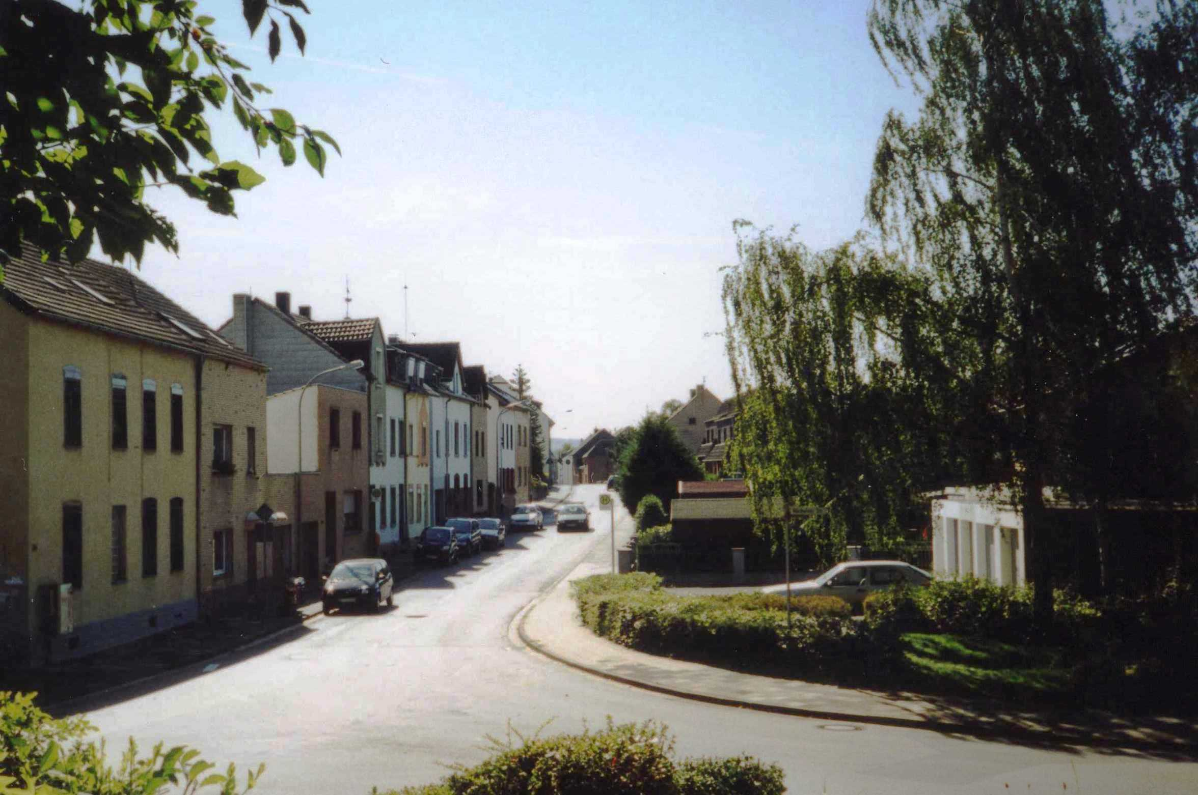 Ost-West-Durchfahrt des Eschweiler Stadtteils Hücheln - fotografiert aus Richtung Wilhelmshöhe in Richtung Nothberg)